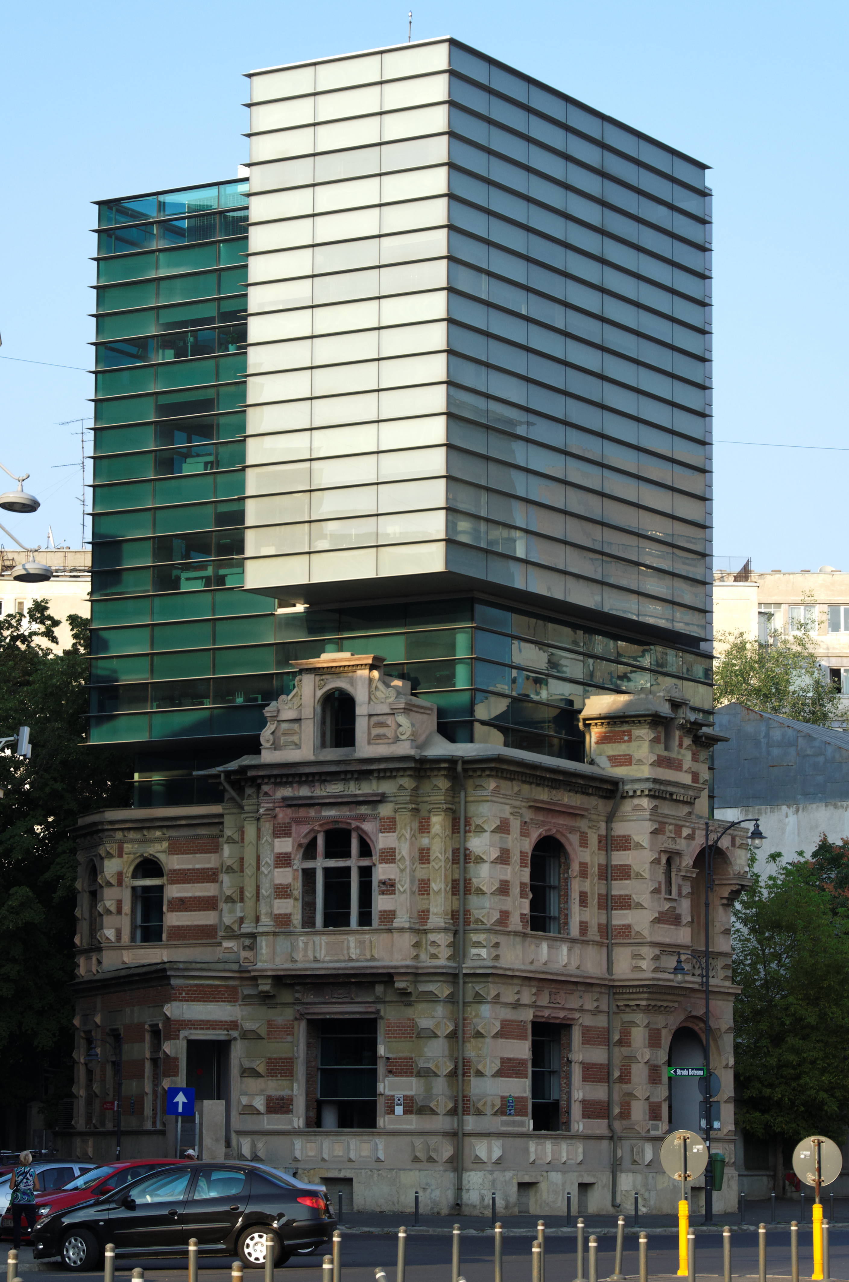 Siège de l'Union des architectes de Roumanie situé au 5 Demetru Doberescu à Bucarest. L'immeuble est posé sur le bâtiment fin XIXe siècle de feu la Securitate que les les balles de 1989 ravagèrent. Laissant la ruine intacte, on la coiffa d'un immeuble de verre